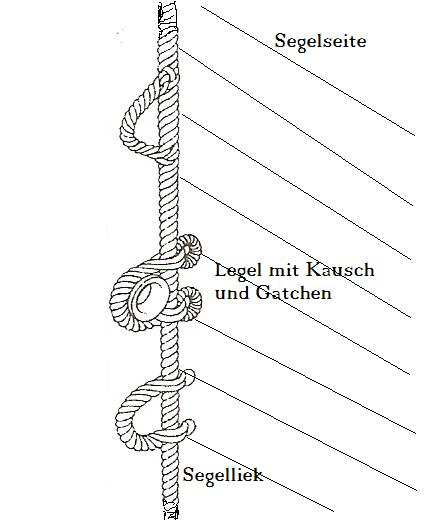 Als Legel, hier drei verschiedene Arten, wird eine eingespleisste Schlaufe oder ein entsprechend eingearbeiteter Ring aus Tauwerk am Liek eines Segels bezeichnet.